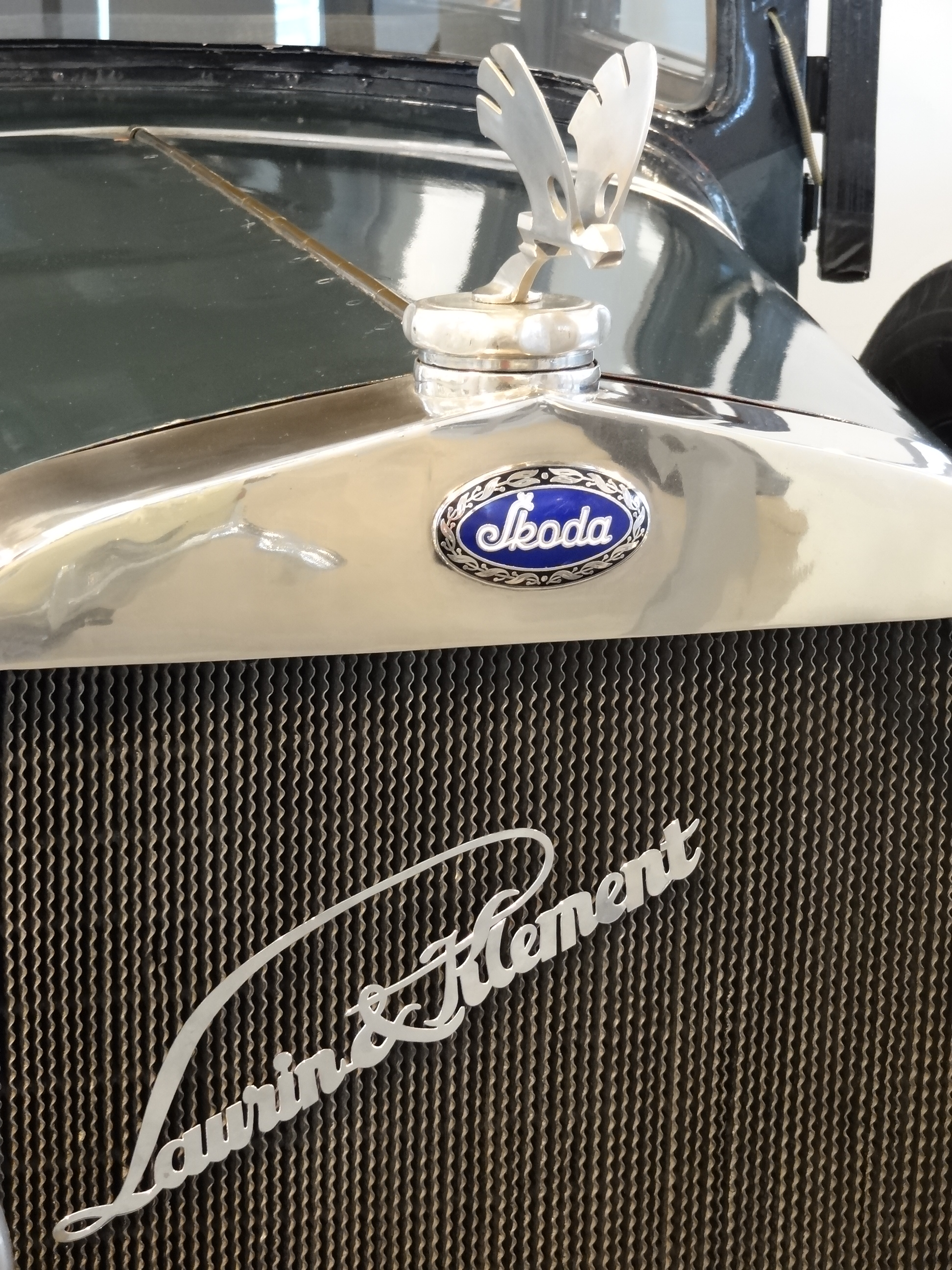 2014 Škoda Museum, L&K Škoda 110, Hood ornament